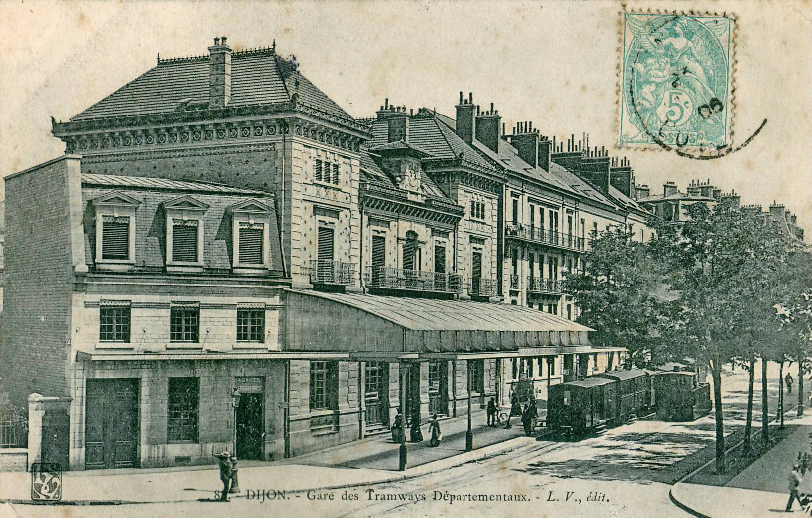 Carte postale ancienne éditée par L. V., éditeur, n°81 Dijon - Gare des Tramways Départementaux. Le réseau était à l'époque exploité par la Compagnie des chemins de fer du Sud de la France.